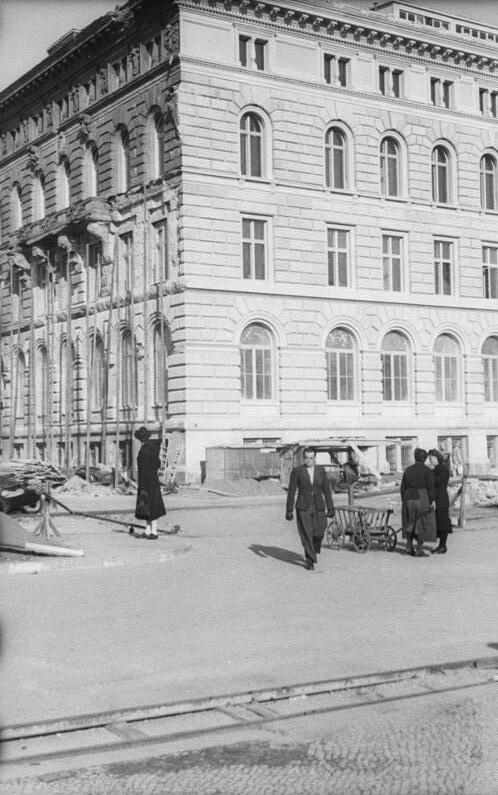 Berlin, Deutscher Volksrat, Gästehaus, Bau Das Gästehaus des Volksrates geht seiner Vollendung entgegen. Aufnahme: Illus/Kemlein 31.10.1949 [Berlin, Wilhelmplatz.- Bau des Gästehauses des Deutschen Volksrats]